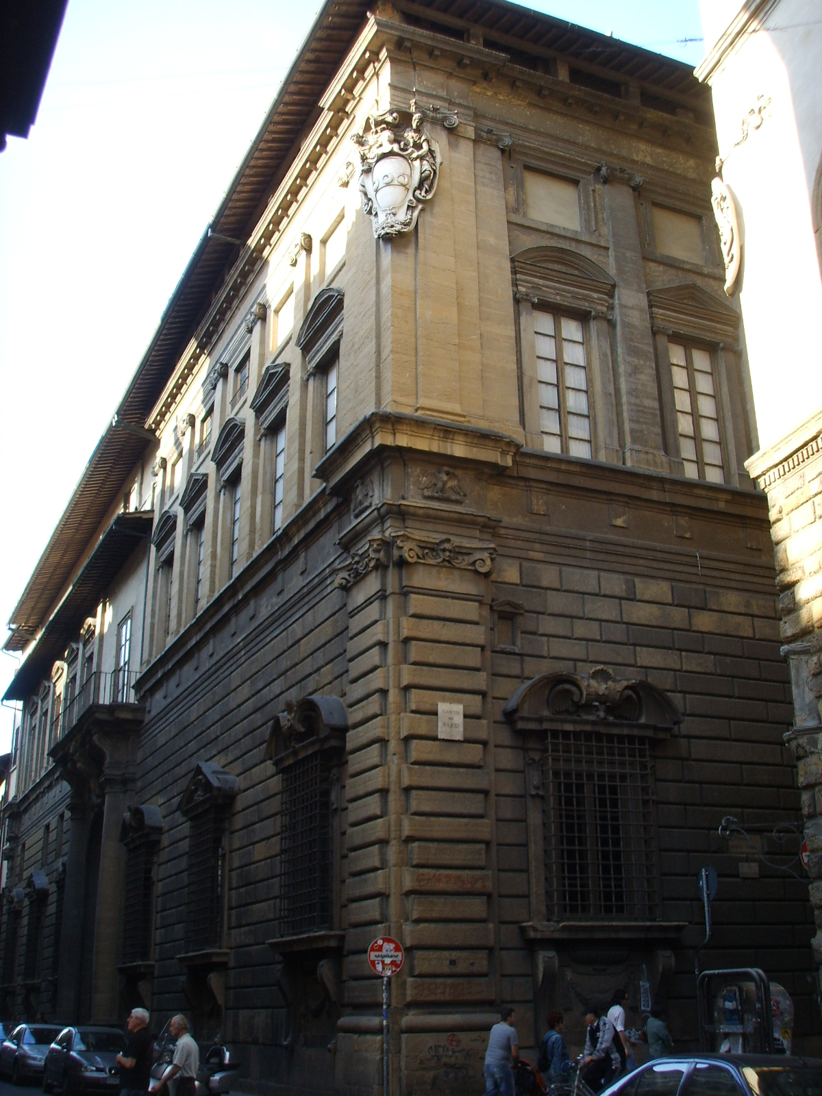 Palazzo nonfinito, view